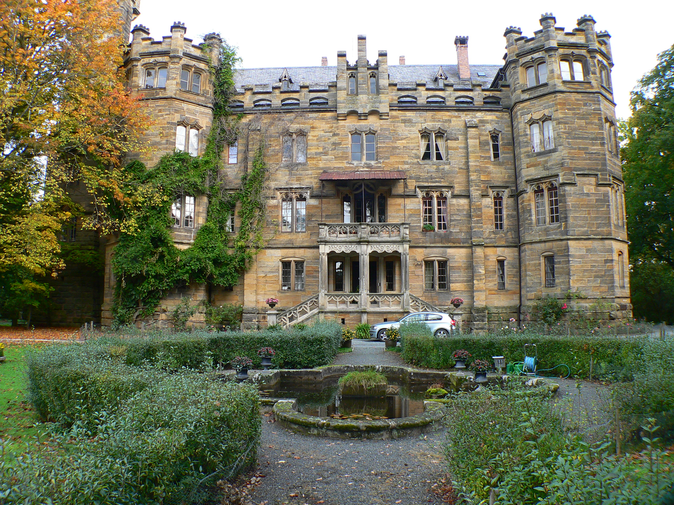 Schloss in Küps-Oberlangenstadt, Bayern, Regierungsbezirk Oberfranken, Landkreis Kronach - Gartenseite